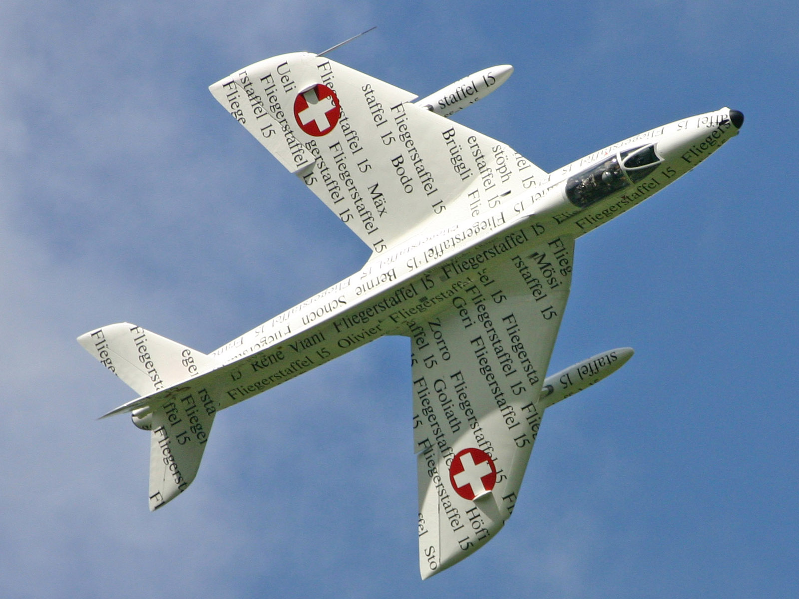 Papyrus Hawker Hunter Mk.58 J-4040 HB-RVS, Hunterverein Obersimmental. Pilotiert von Ueli Leutert, fünfzehnter und letzter Kommandant der Fliegerstaffel 15.